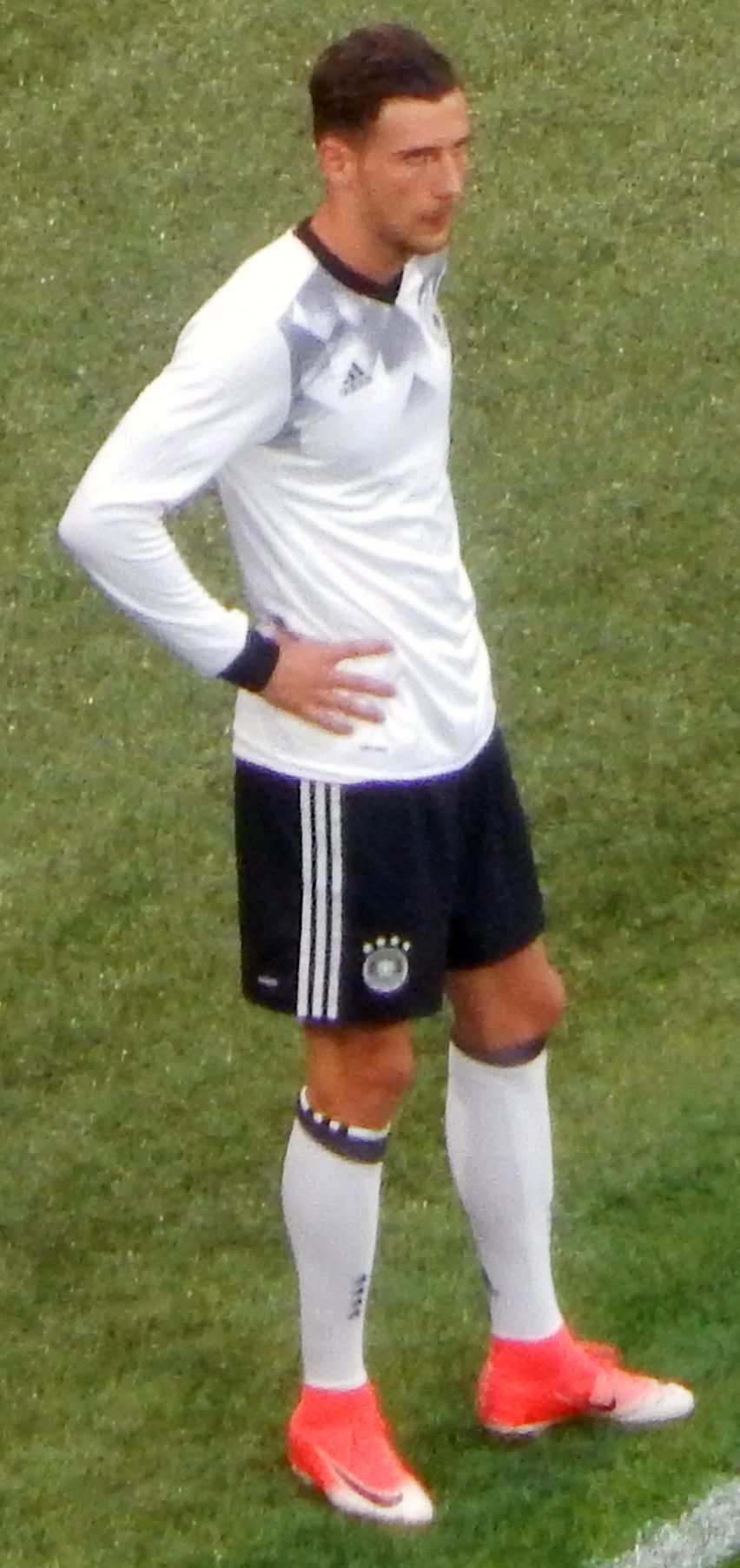 Финал Кубка конфедераций 2017